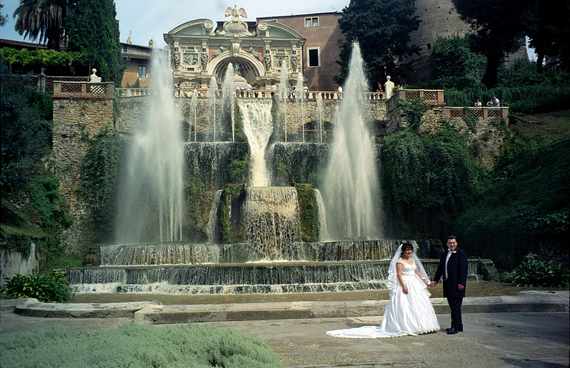 Villa d'Este, Tivoli